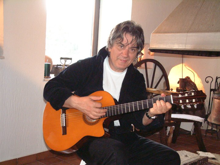 Slobodan M Kovacevic , umjetnik